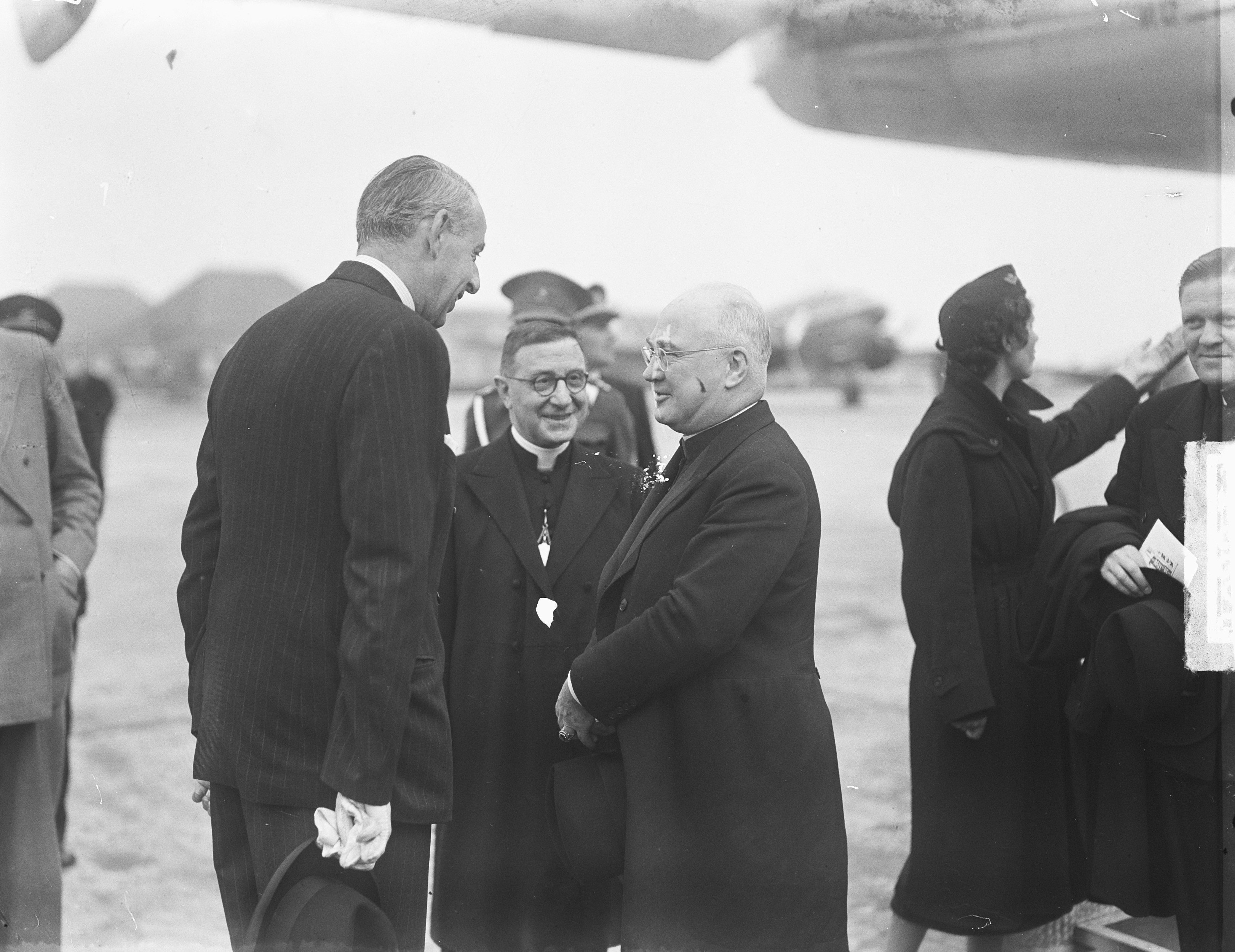 Collectie / Archief : Fotocollectie Anefo Reportage / Serie : [ onbekend ] Beschrijving : Kardinaal Spellman Datum : 30 september 1949 Persoonsnaam : Kardinaal Spellman Fotograaf : Noske, J.D. / Anefo Auteursrechthebbende : Nationaal Archief Materiaalsoort : Glasnegatief Nummer archiefinventaris : bekijk toegang 2.24.01.09 Bestanddeelnummer : 903-6334